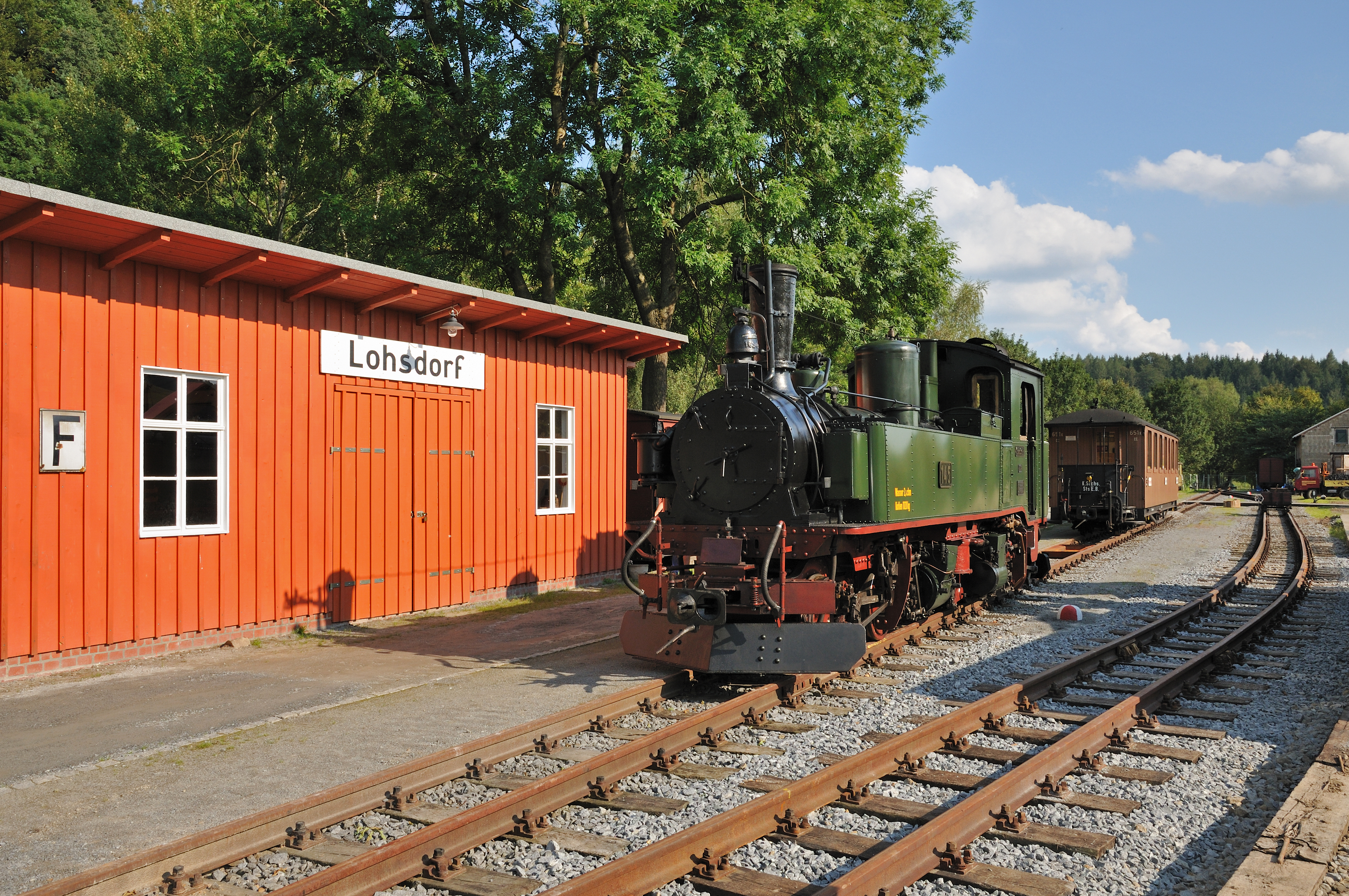 Die Aufnahme entstand zum 3. Bahnhofsfest des Schwarzbachvereins am 27./28.8.2011